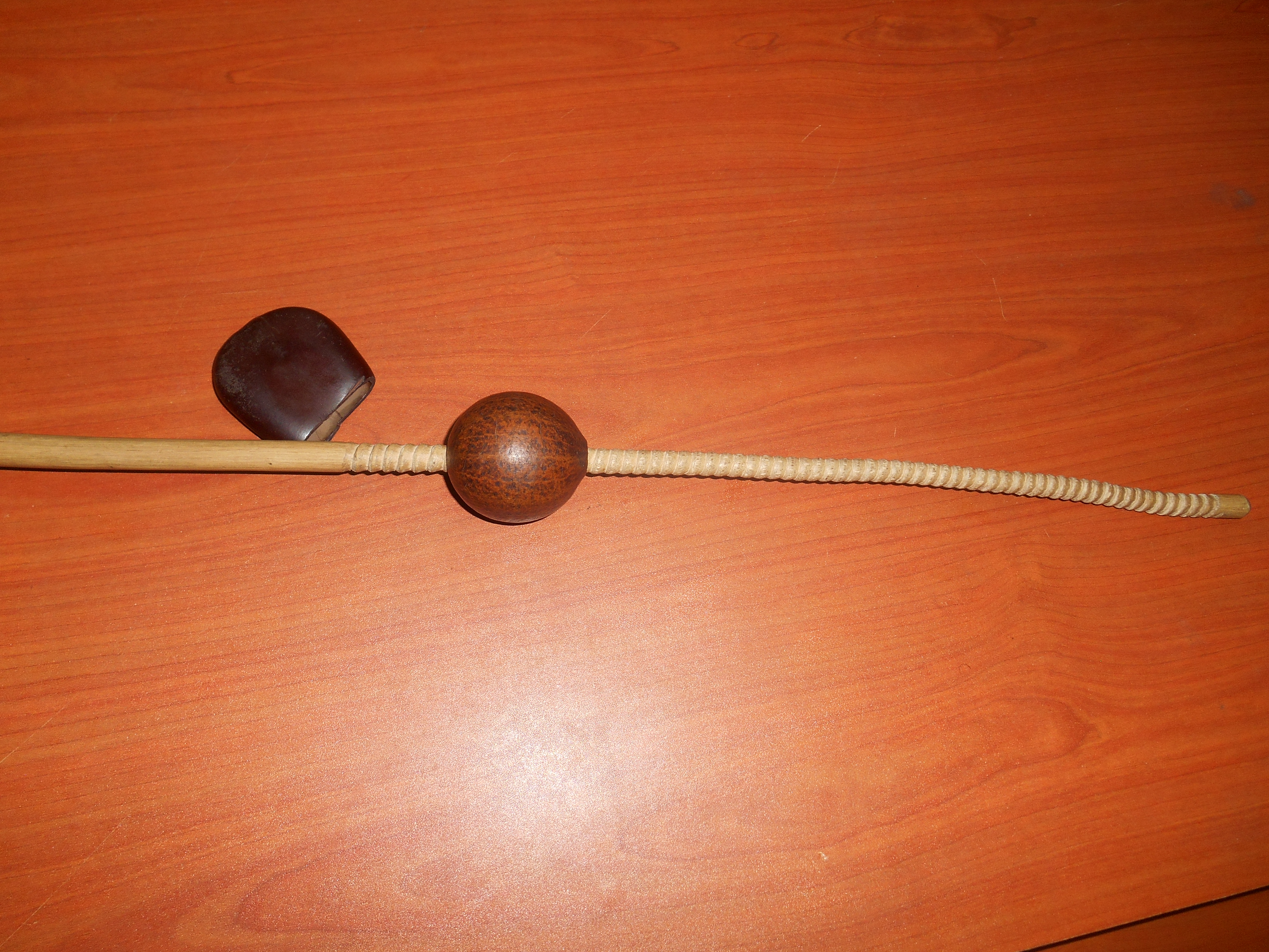 L'Ahoco est un instrument de musique traditionnelle des Baoulés, un peuple originaire du centre de la Côte d'Ivoire. Cet instrument est promu l'artiste chanteuse tradi-moderne ivoirienne Antoinette Konan. Il s'agit d'un bâton que l'on racle à l'aide d'une écorce de fruit séché et d'une coquille de noix aplatie. This is an image from Ivory Coast